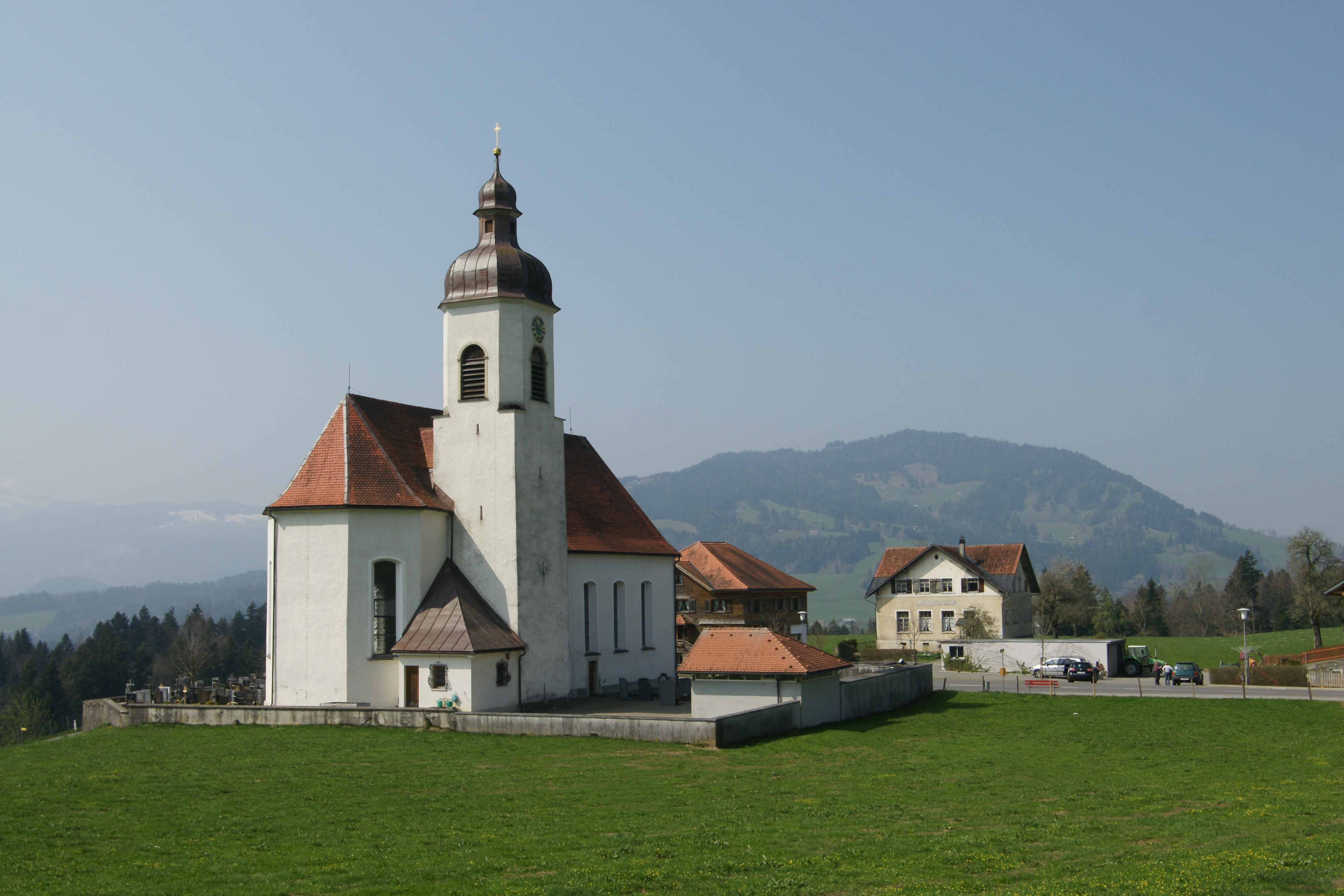 Pfarrkirche: Unsere Liebe Frau Mariä Heimsuchung in Langenegg.